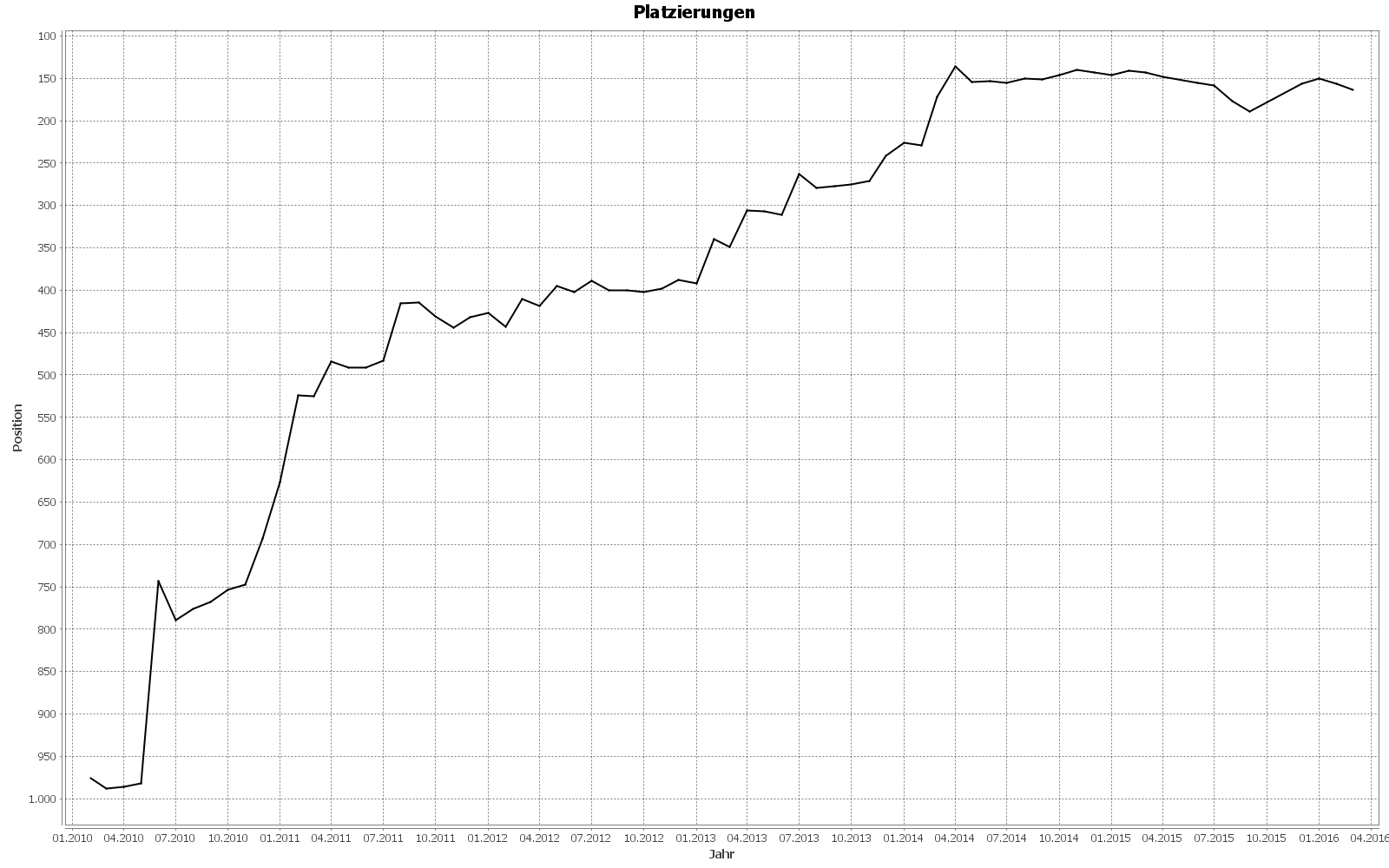 Verlauf der WRL